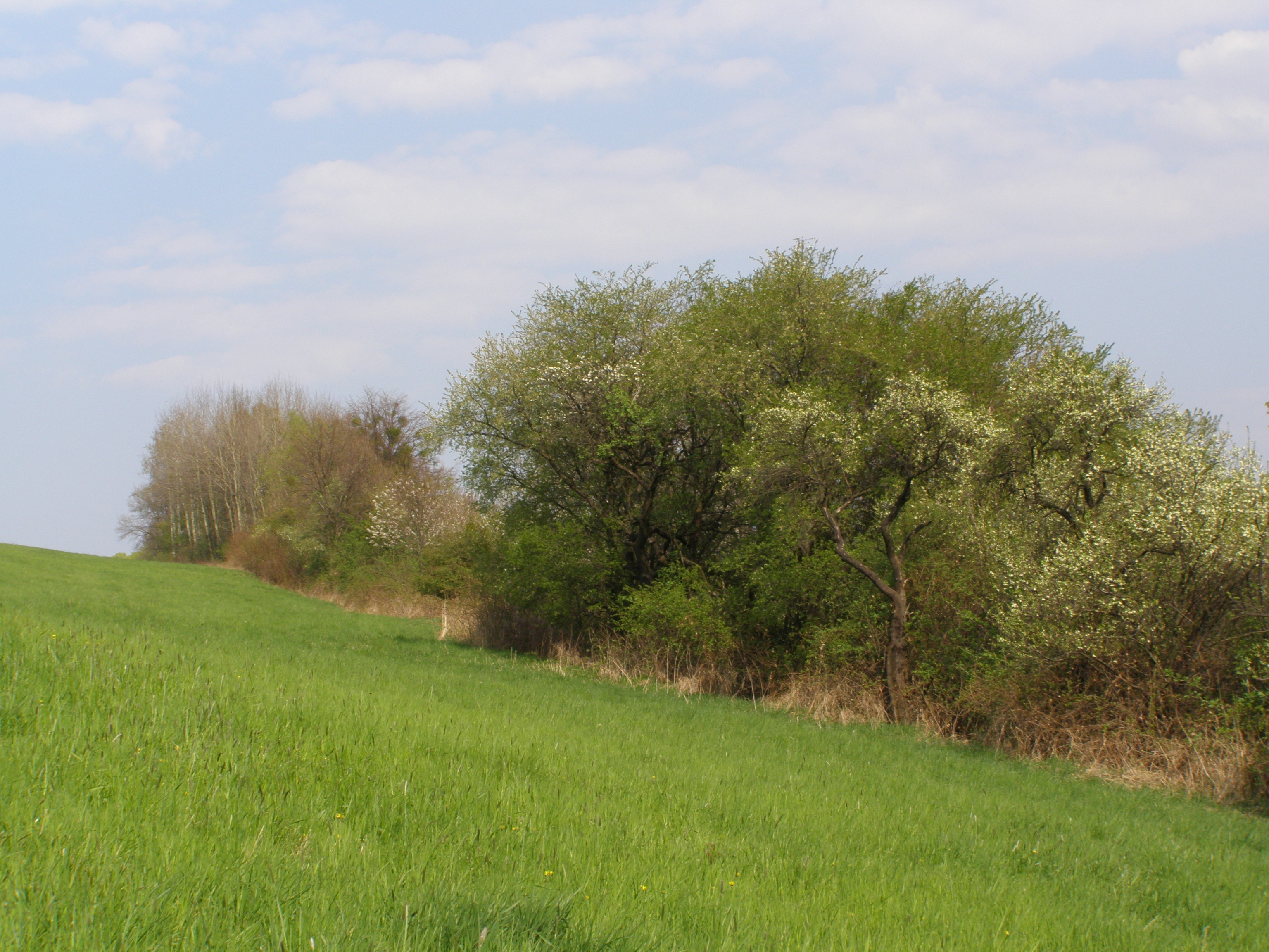 Česky: Metylovická pahorkatina, remízek na jižním úbočí vrcholu Lišky (457 m)